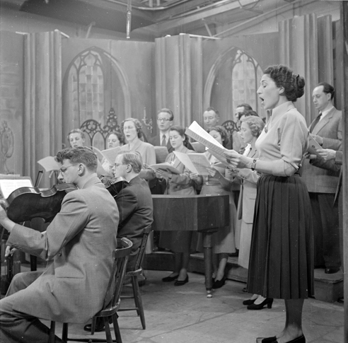 Setfoto's van NCRV's Studiodienst: Nederlands Kamerkoor